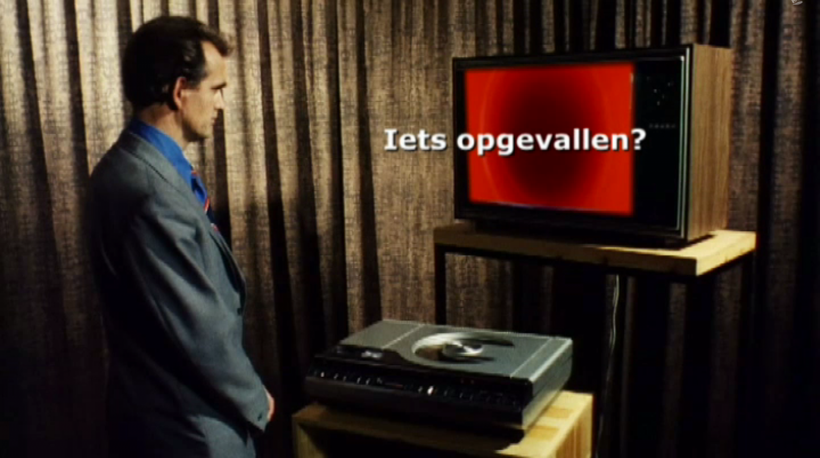 Een man met een laserdicsspeler en televisie. Dit beeld wordt in De Wereld Draait Door gebruikt als afsluiting van de rubriek De Televisie Draait Door.